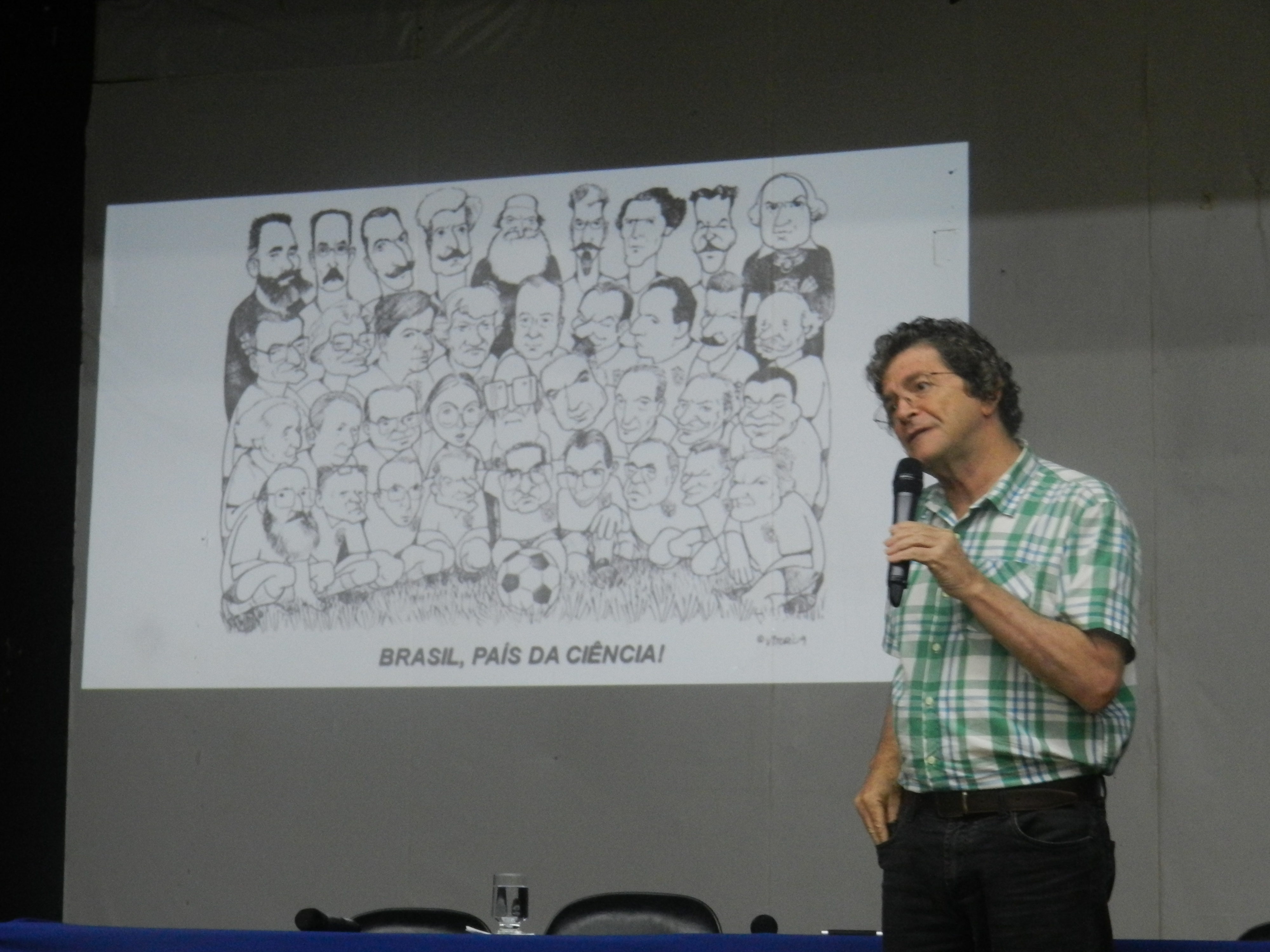 Apresentação do Presidente da SBPC na II Conferência de Educação Científica do Sul da Bahia 10-2018